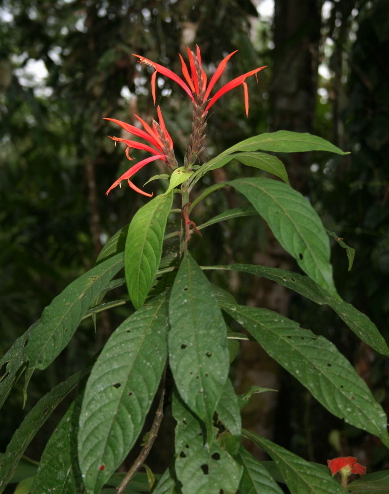 Aphelandra golfodulcensis, Akanthusgewächse (Acanthaceae) - Costa Rica: Prov. Puntarenas, La Gamba NW Golfito, "Fila Trail" NW "Tropenstation La Gamba"/"Estación Biológica La Gamba"